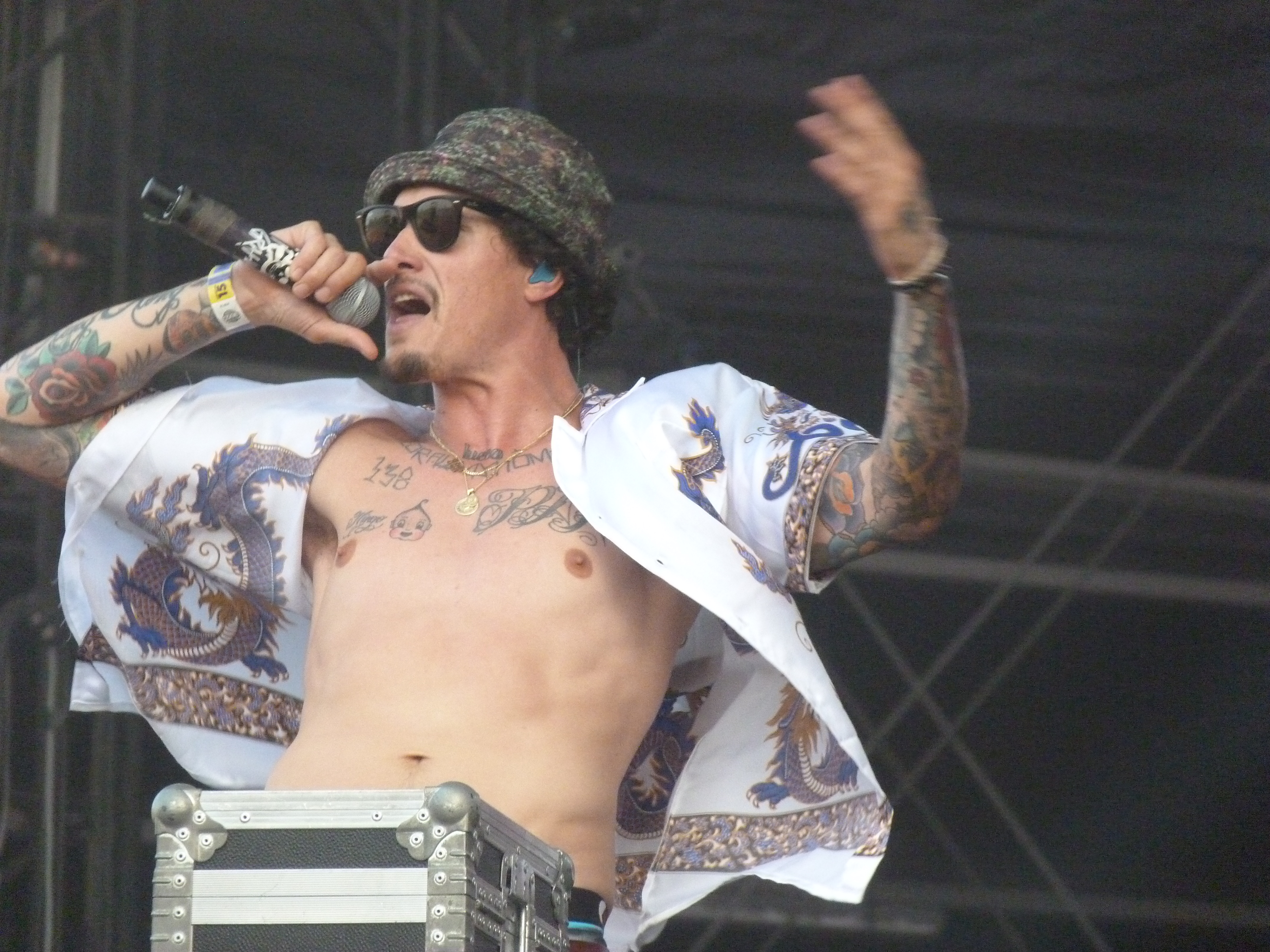 Live on the 15th of August, 2015. Sziget Festival. Hollywood Undead band.